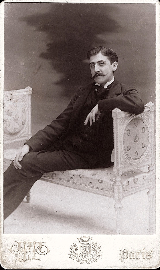 Photo-carte de visite de Marcel Proust, par Otto Wegener, vers 1895.